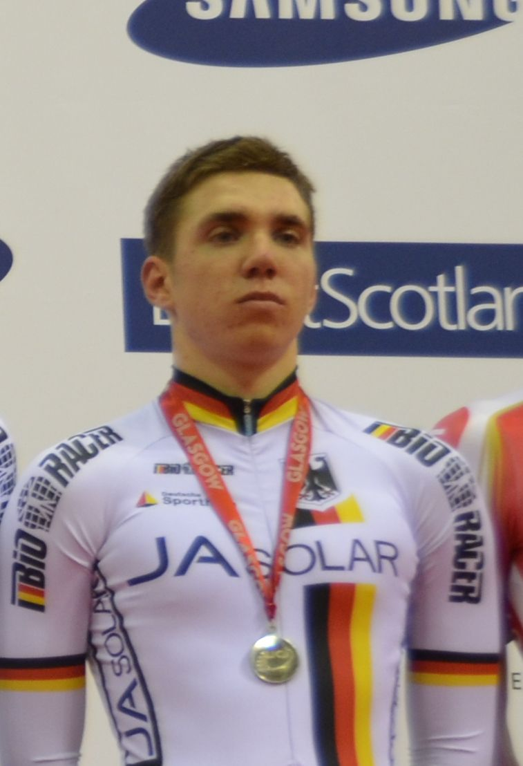 Maximilian Beyer, deutscher Radsportler